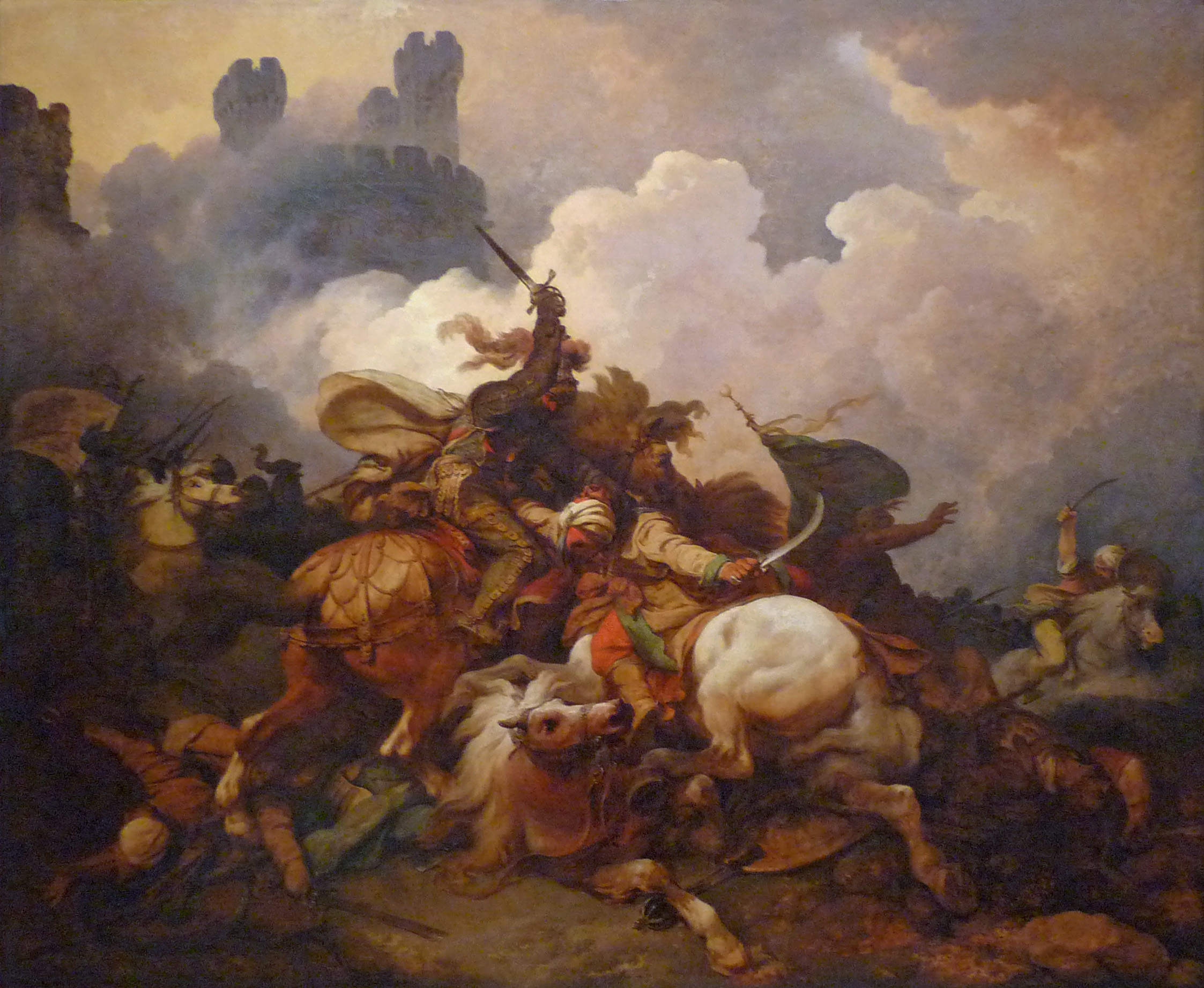 Philippe-Jacques de Loutherbourg, Richard Coeur de Lion à la bataille de Saint-Jean d'Acre, New Walk Museum and Art Gallery, Leicester